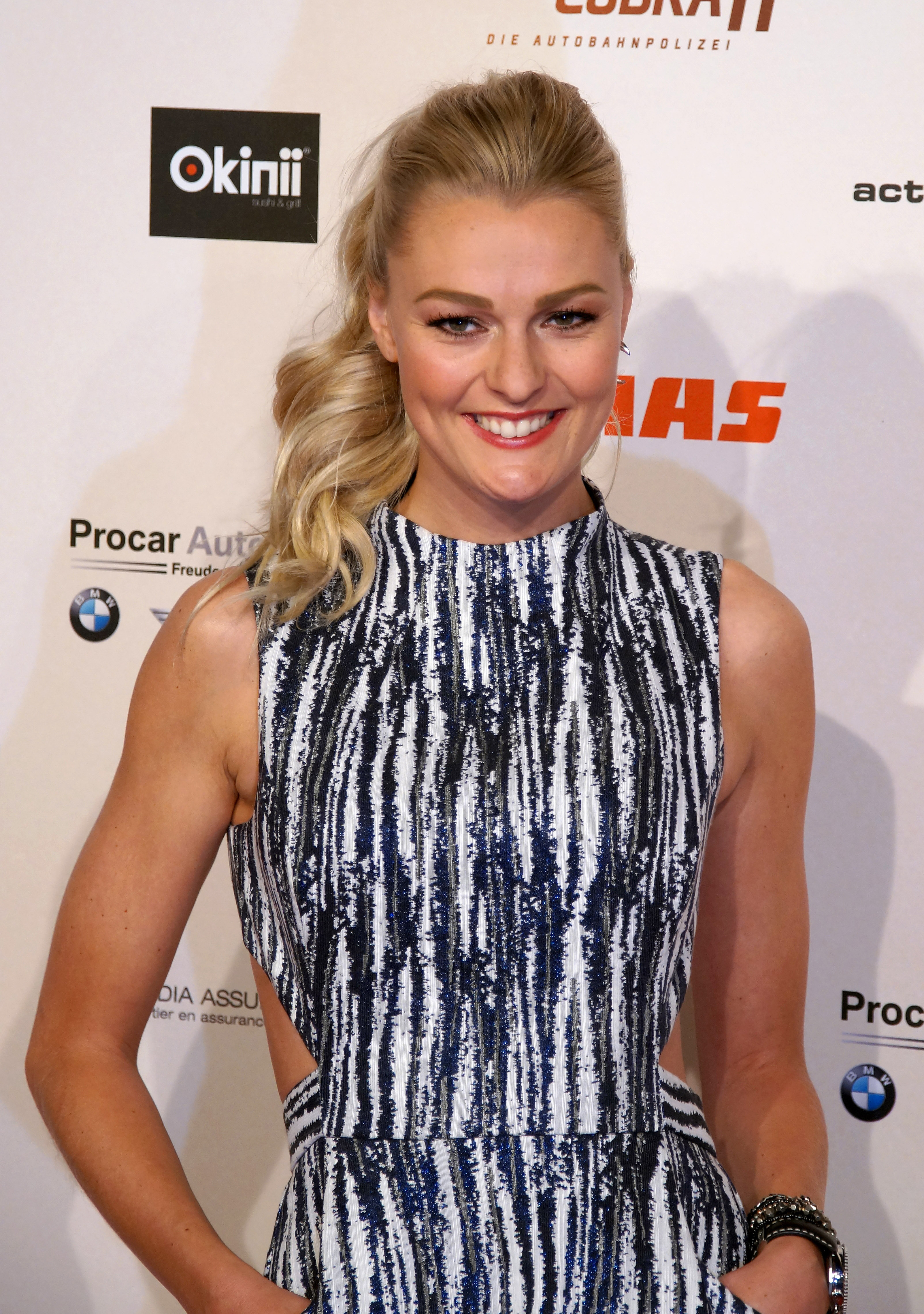 Miriam Höller bei der Premiere von der 300. Folge 'Alarm für Cobra 11', April 2016.